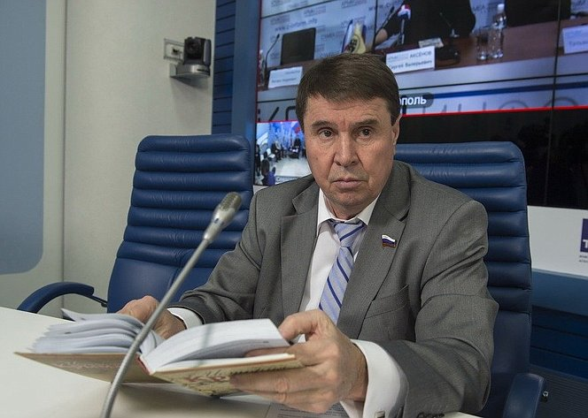 Sergei Tsecov, politician